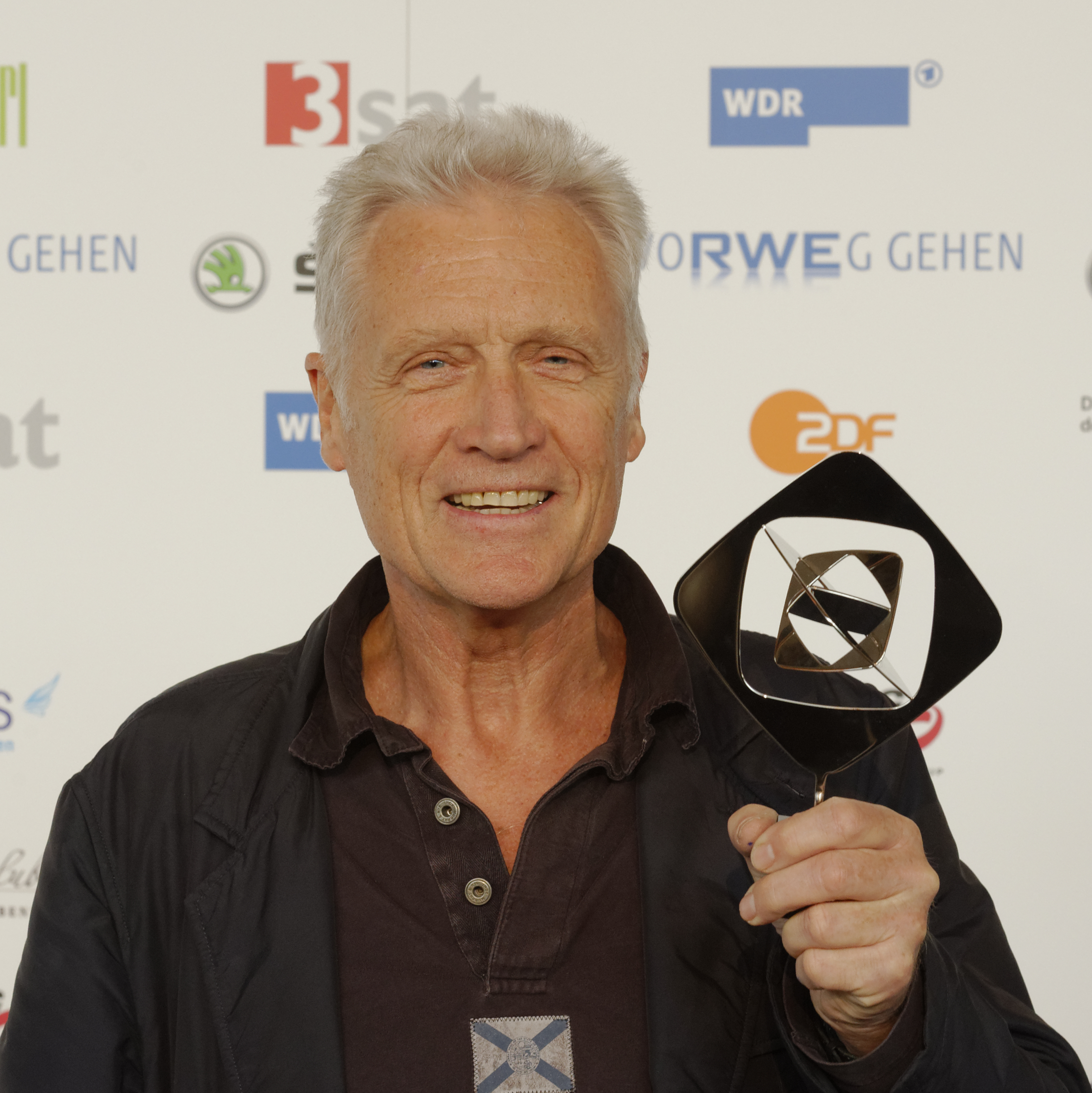 Grimme-Preis 2013 Pressekonferenz und Preisverleihung